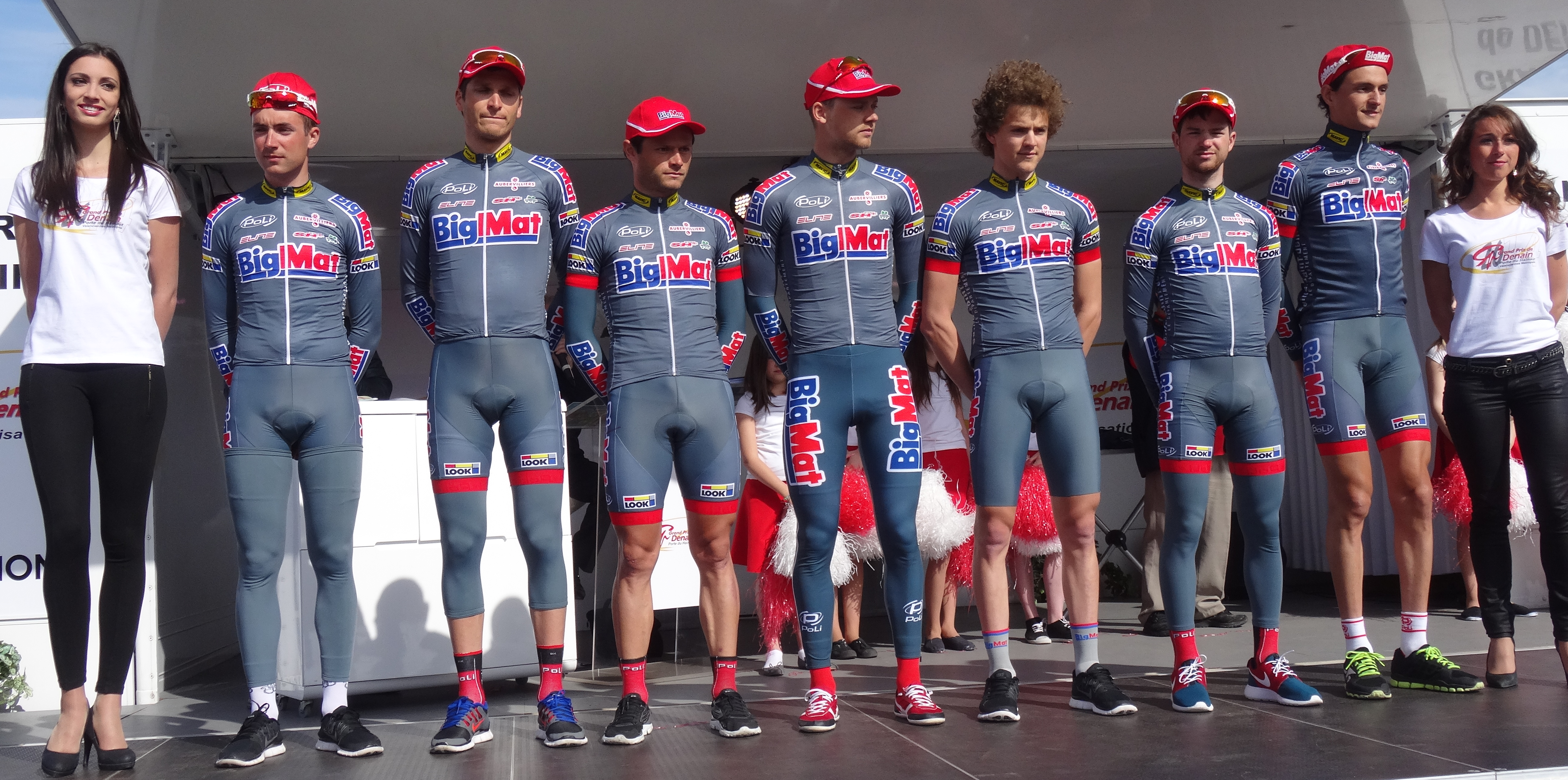 Reportage réalisé le jeudi 17 avril à l'occasion du départ et de l'arrivée du Grand Prix de Denain 2014 à Denain, Nord, Nord-Pas-de-Calais, France.